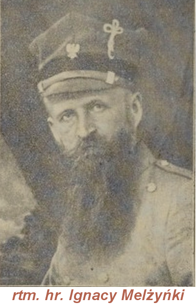 rtm. hr. Ignacy Mielżyński (1871-1938)